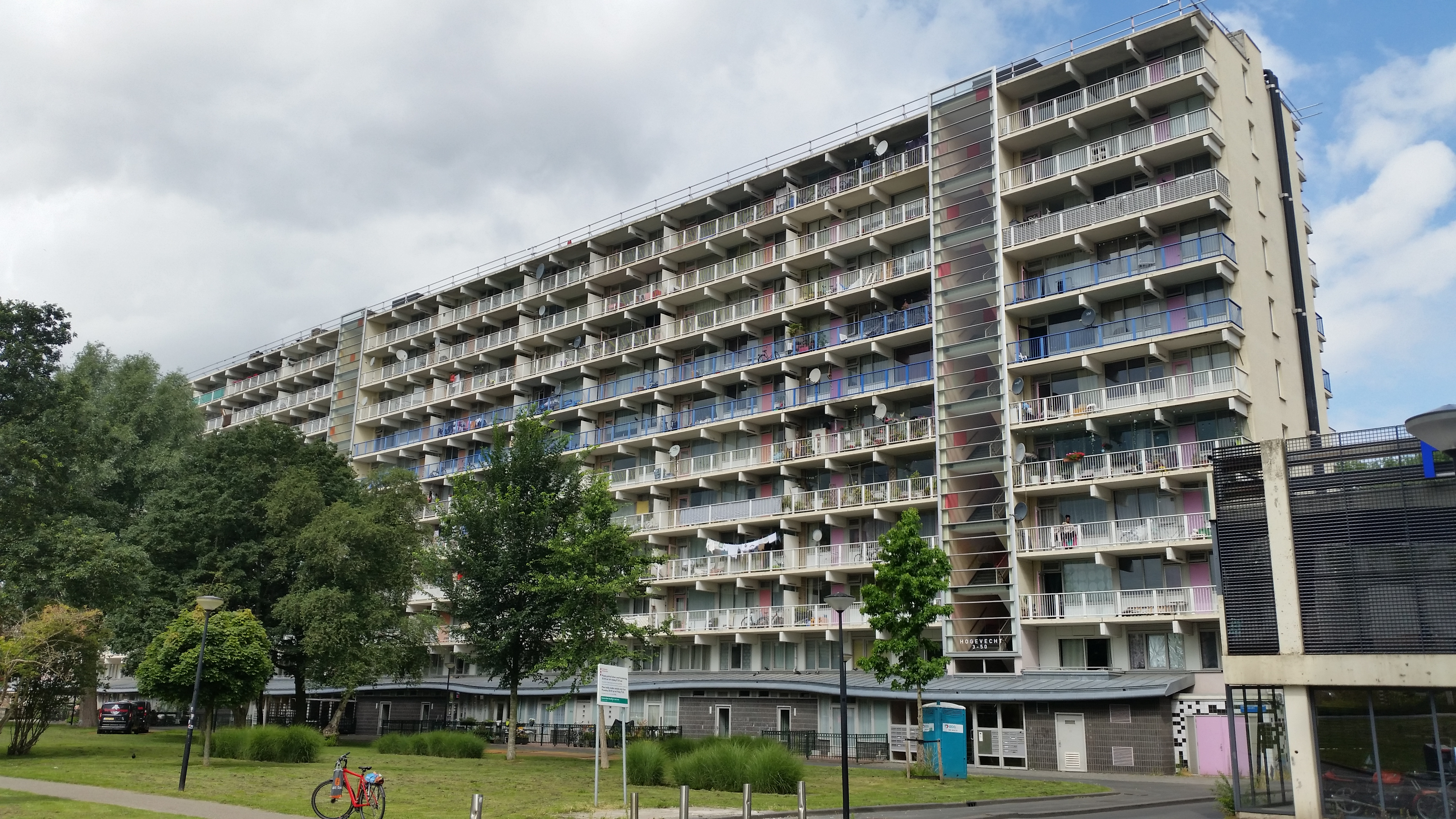 Impressie van flats Hogevecht